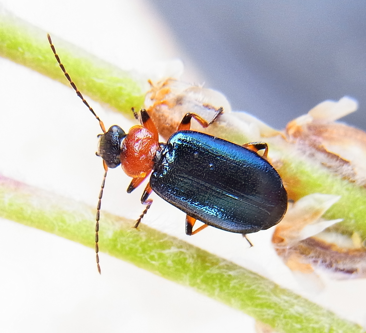 Lamprias cyanocephalus aus Spanien, bei 50780 Sastago, Zaragosa, Aragonien, am 27. Mai 2013